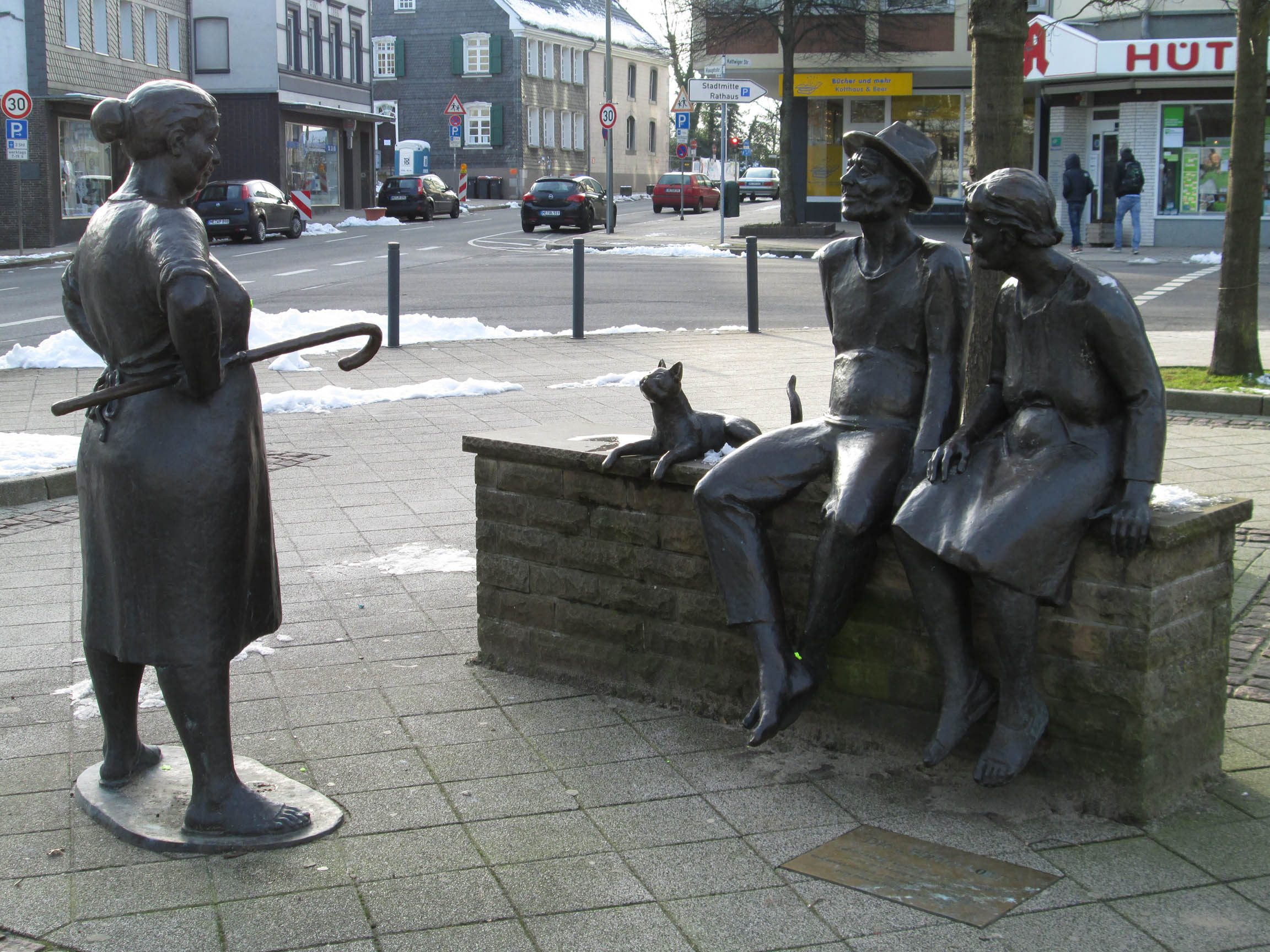 Bronzefiguren auf dem Kirchplatz in Heiligenhaus